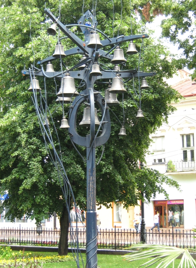 Kassa, harangjáték